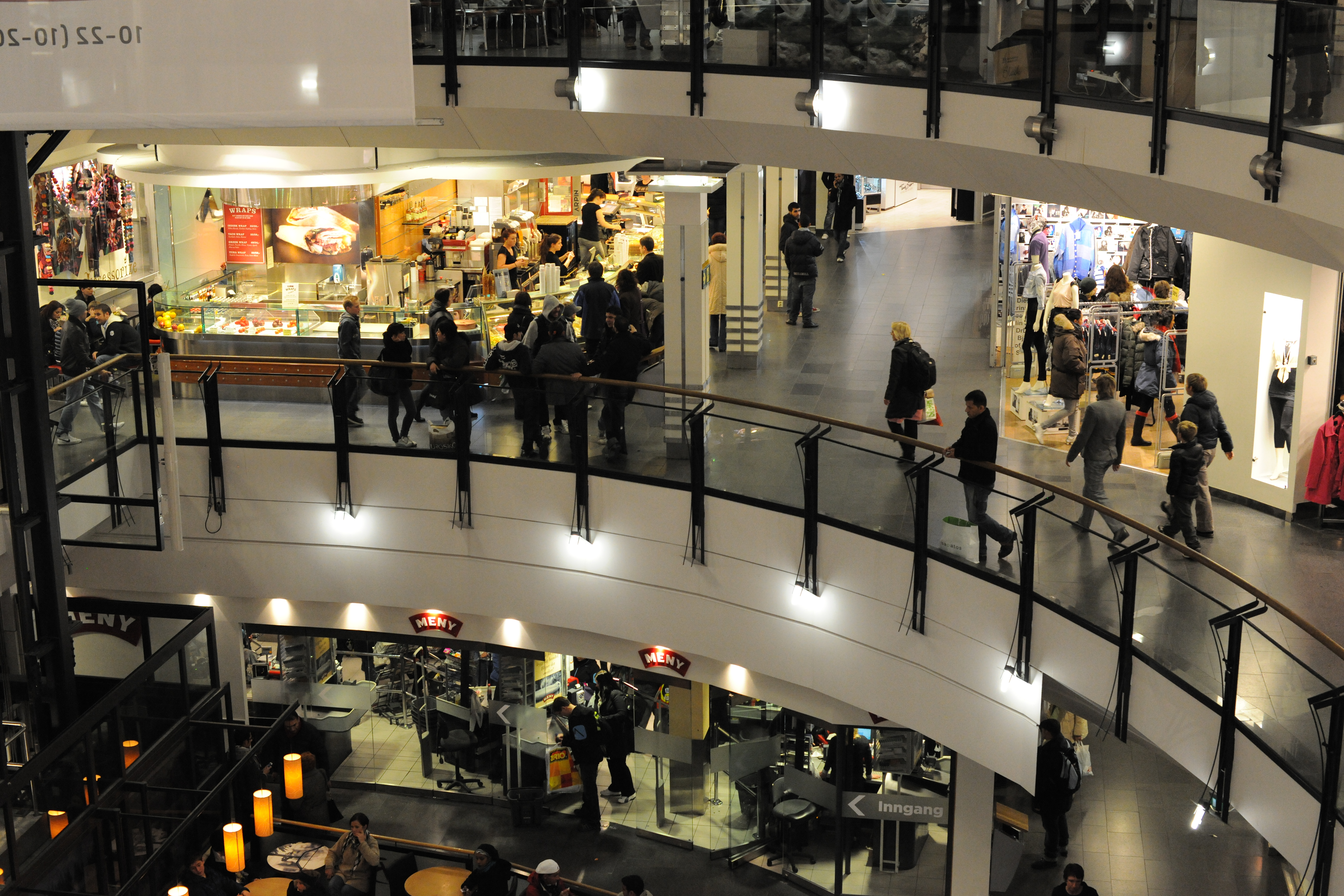 D3X, ISO 3200 Test